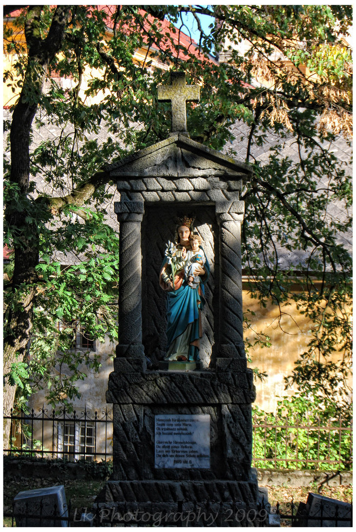 Biserica romano-catolică "Sf. Maria", Lipova, jud Arad Cod LMI AR-II-m-A-00616.01